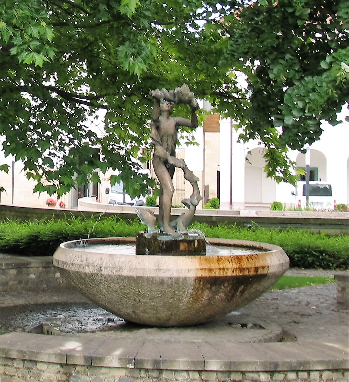 Halas fiú, Paks, Tóth Emőke, bronz, 1987